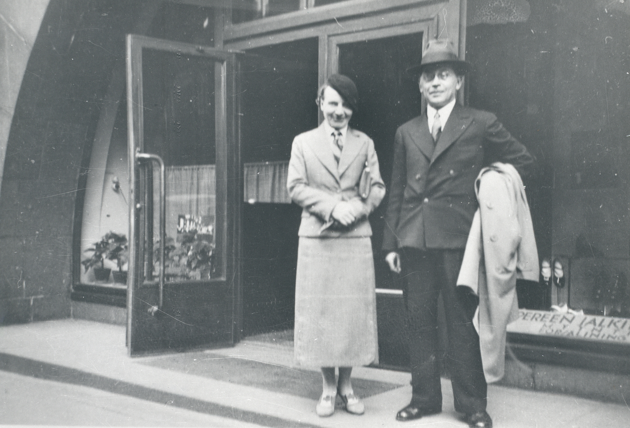 Linda Vilmre ja Friedebert Tuglas Helsingis. Arhiivikirje